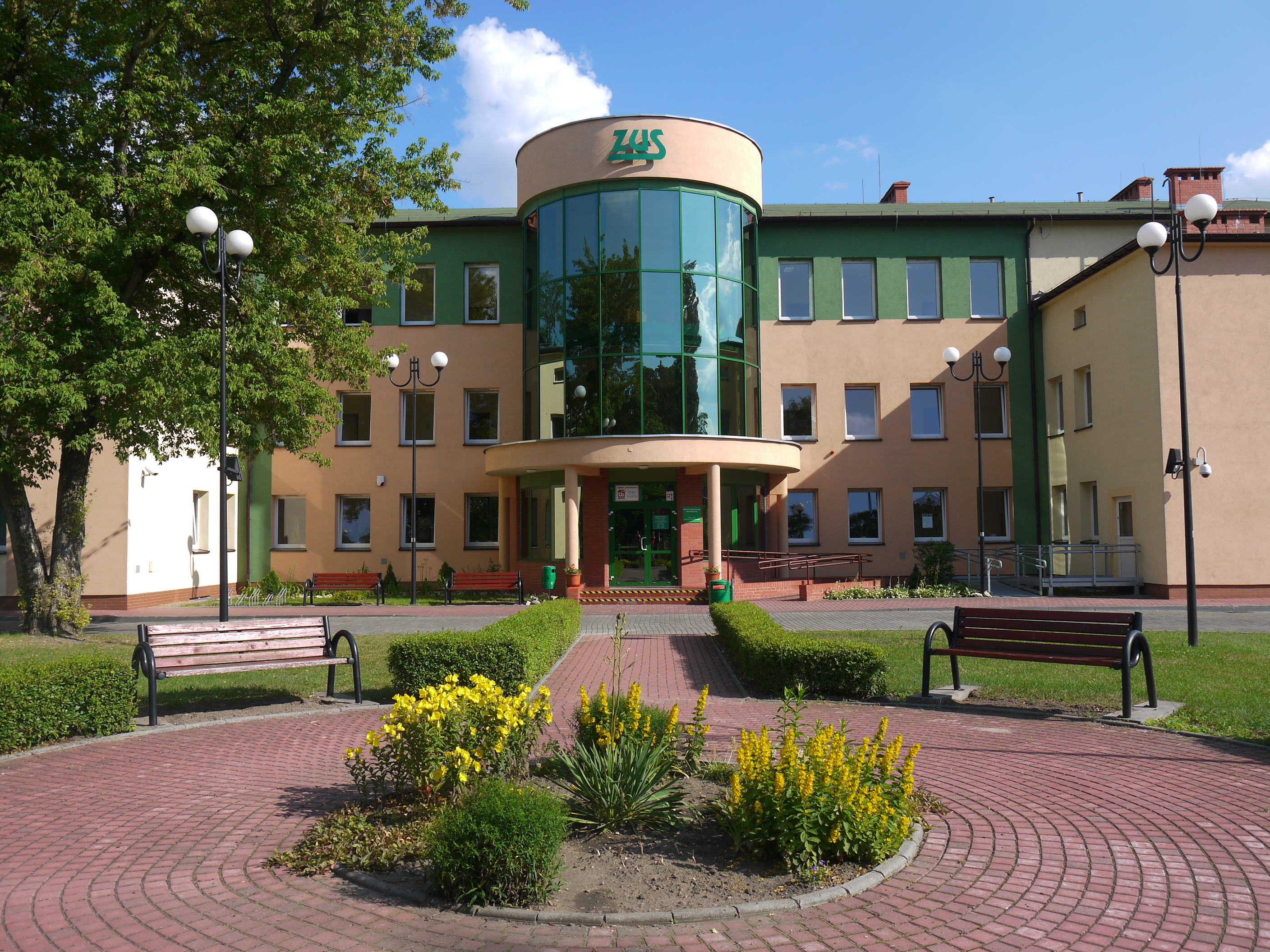 Kędzierzyn - Koźle - widok na ZUS